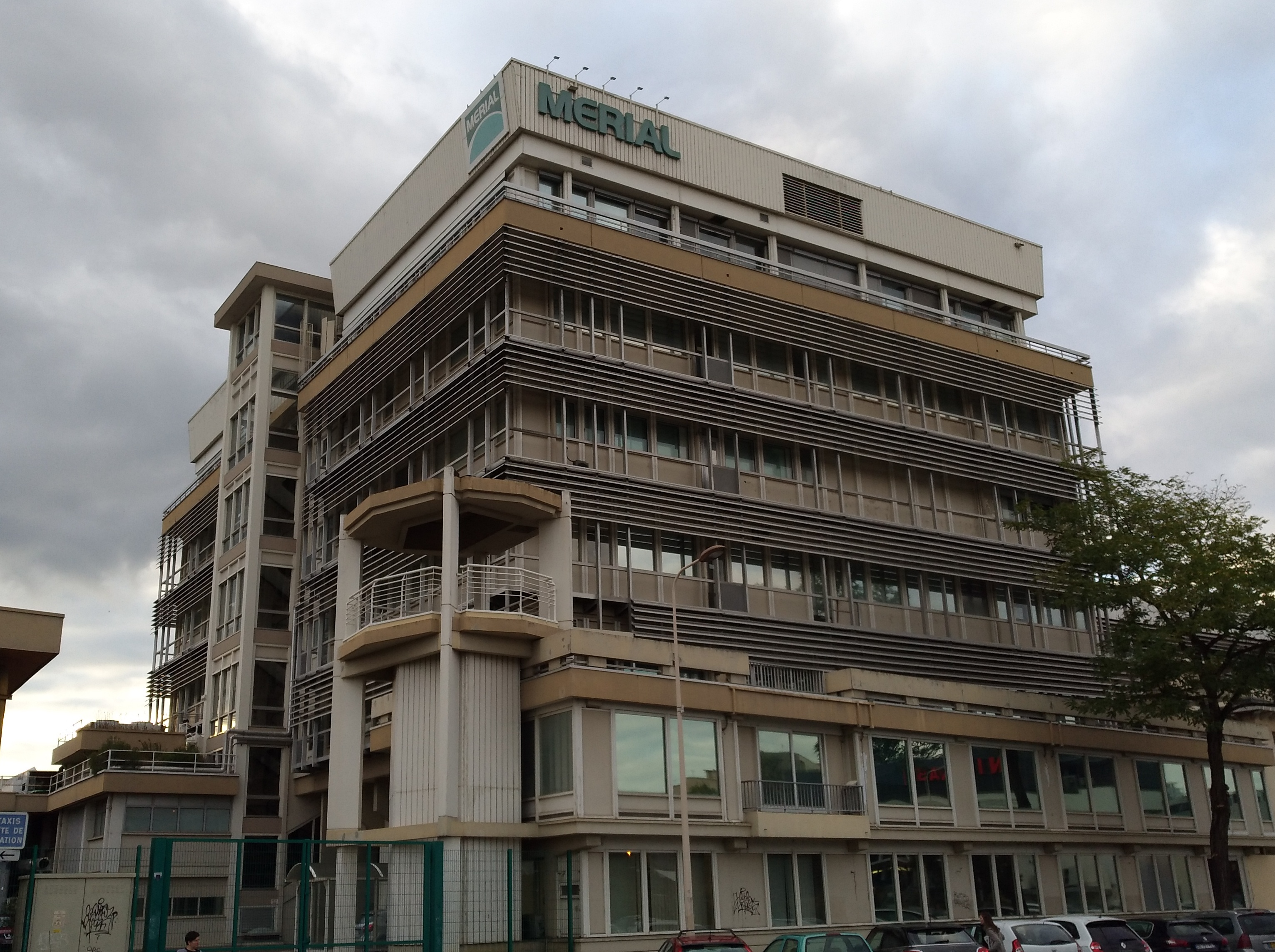 Site Mérial dans le 7e arrondissement de Lyon (France).